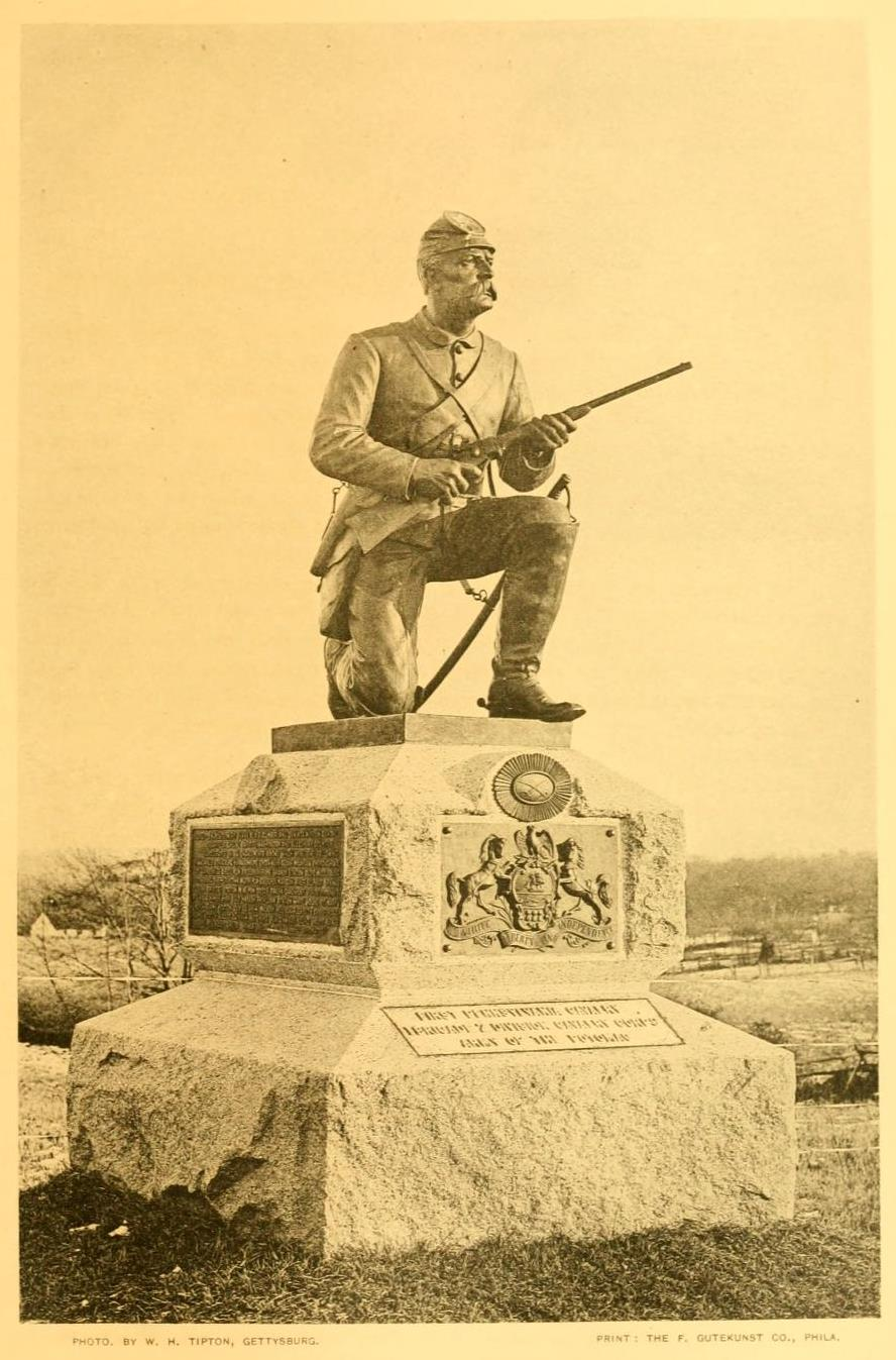 1st Pennsylvania Cavalry Monument, Gettysburg Battlefield.